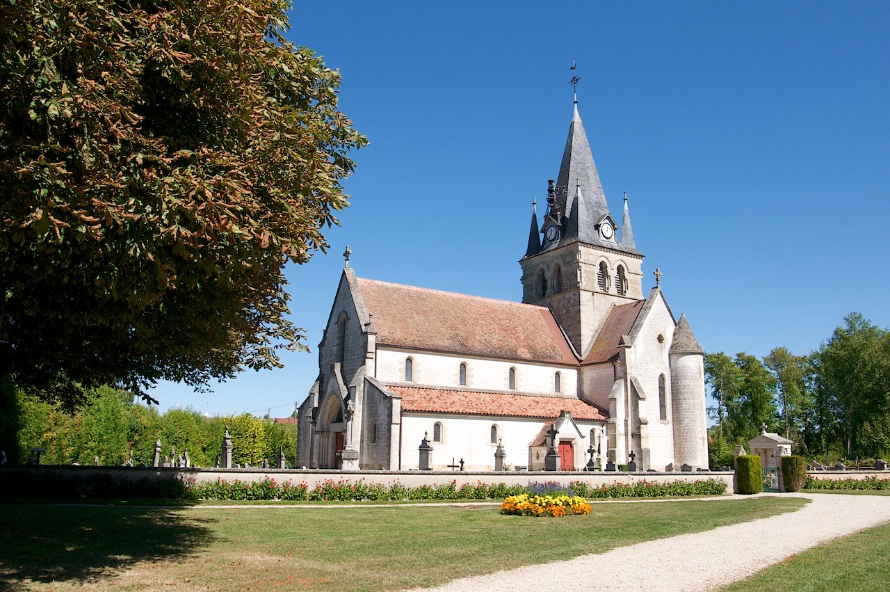 Église de Maisons-en-Champagne (Marne, Champagne-Ardenne, France) .